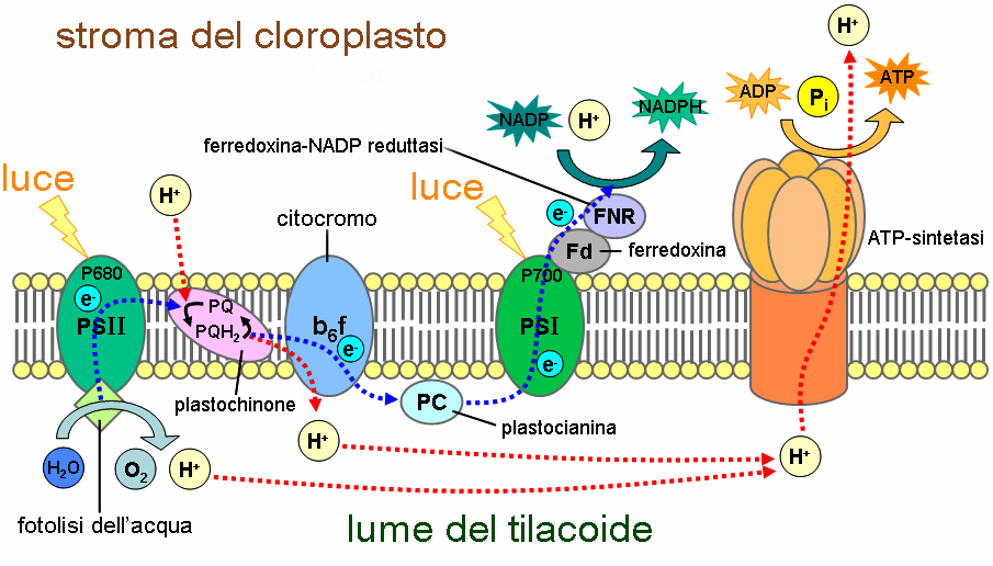 Traduzione dell'immagine :Image:Thylakoid membrane.png